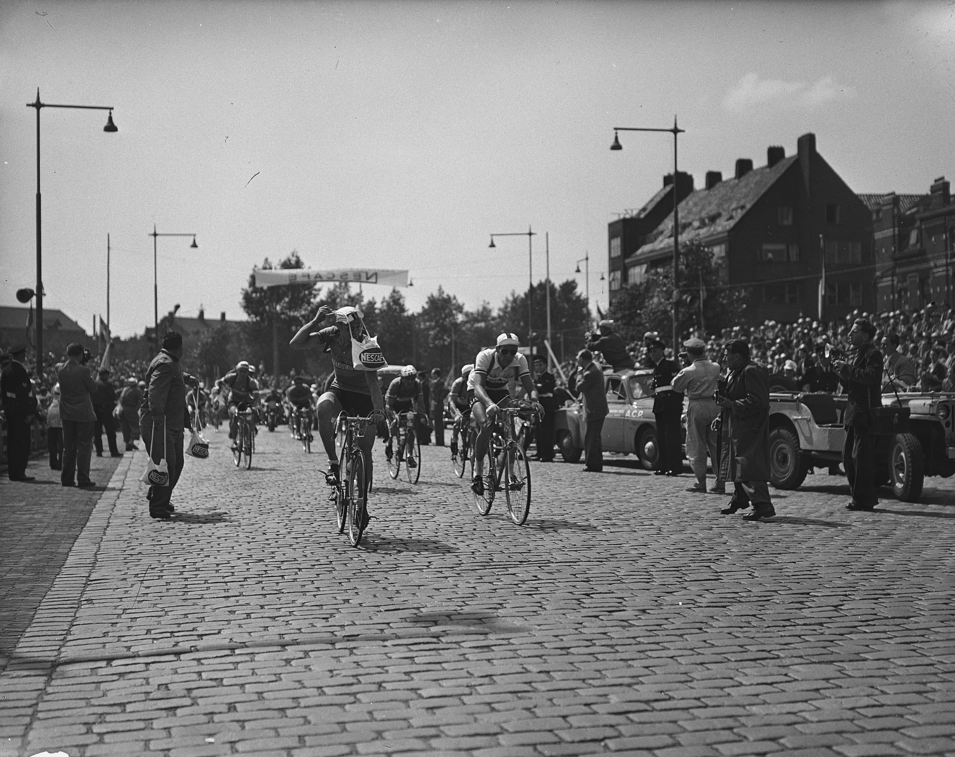 Tour de France , Tour de France renners in Rotterdam, de kop van het peleton passeert Rotterdam.